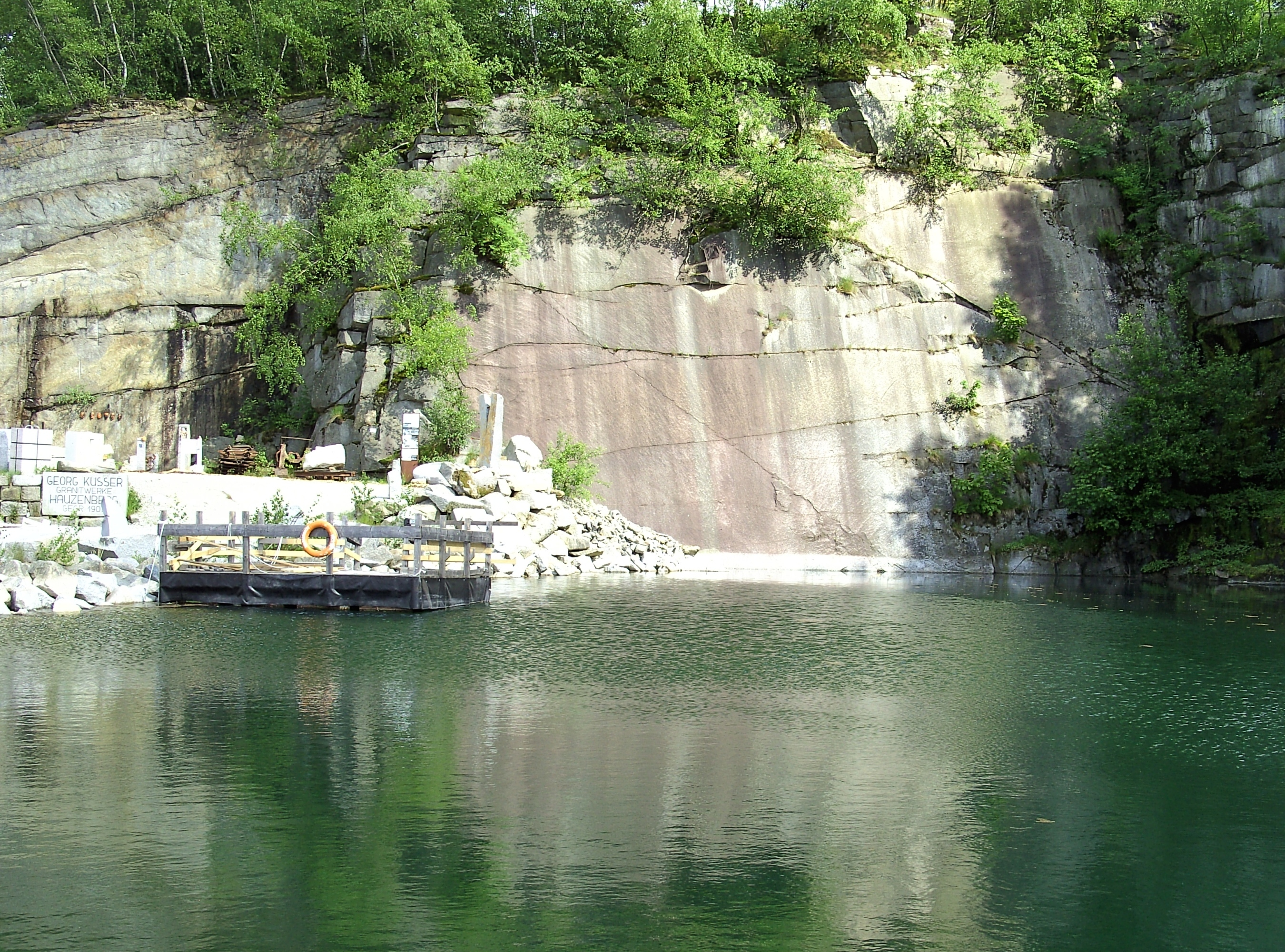 Der See im ehemaligen Granitsteinbruch, heute der Außenbereich des Granitzentrums Hauzenberg.